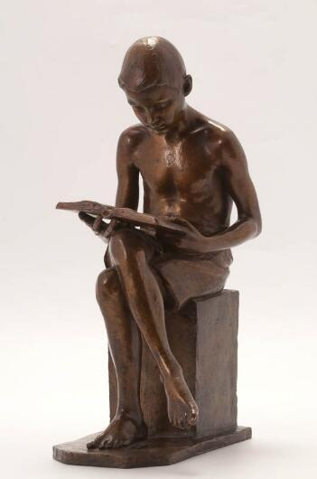 Beeldje van een lezende jongen (1924) van Julie Mijnssen